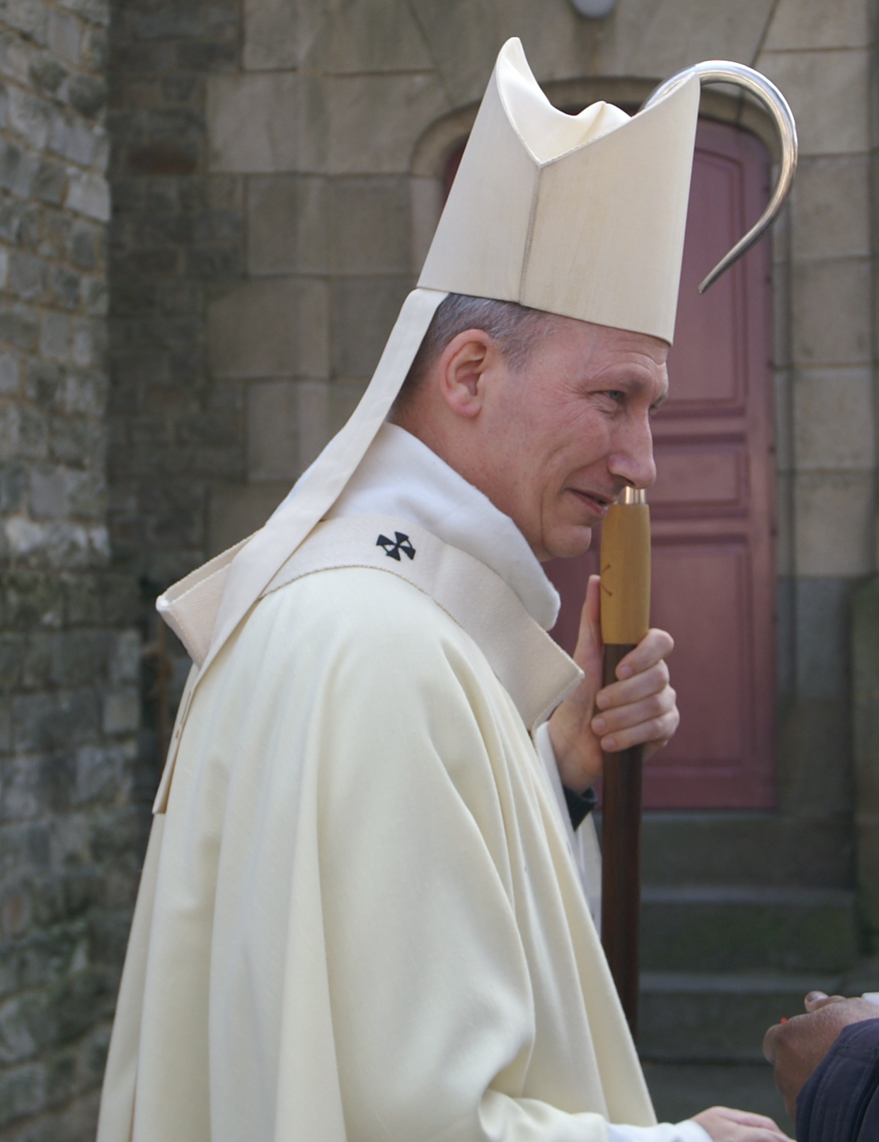 Mgr Pierre d'Ornellas, archevêque de Rennes, lors de la célébration du 100e anniversaire de l'église des Sacrés-Cœurs de Rennes, le 6 mars 2011.